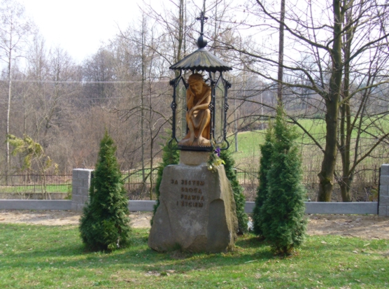 Gruszów (powiat myślenicki)